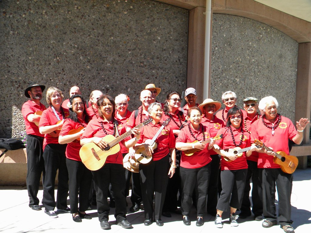 Die Royal Hawaiian Ukulele Band, beim Northern California Ukulele Festival 2011